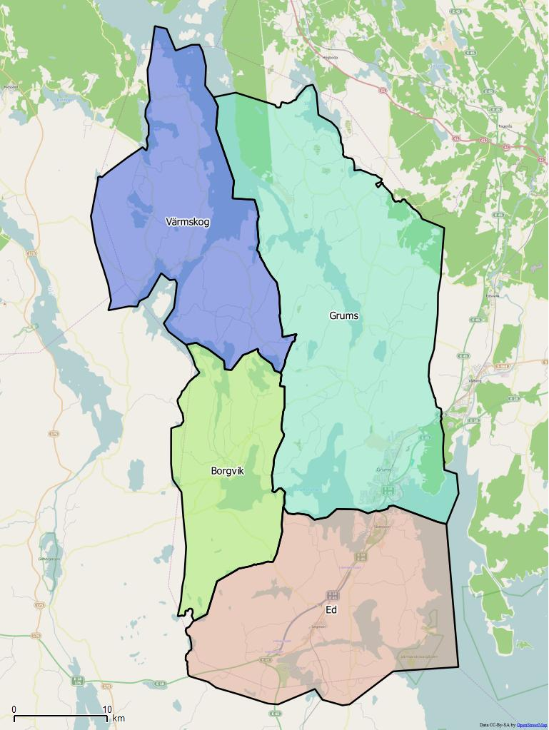 Distriktsindelningen i Grums kommun